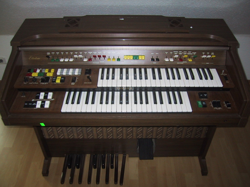 My Yamaha Electone C-35 analog organ :-)